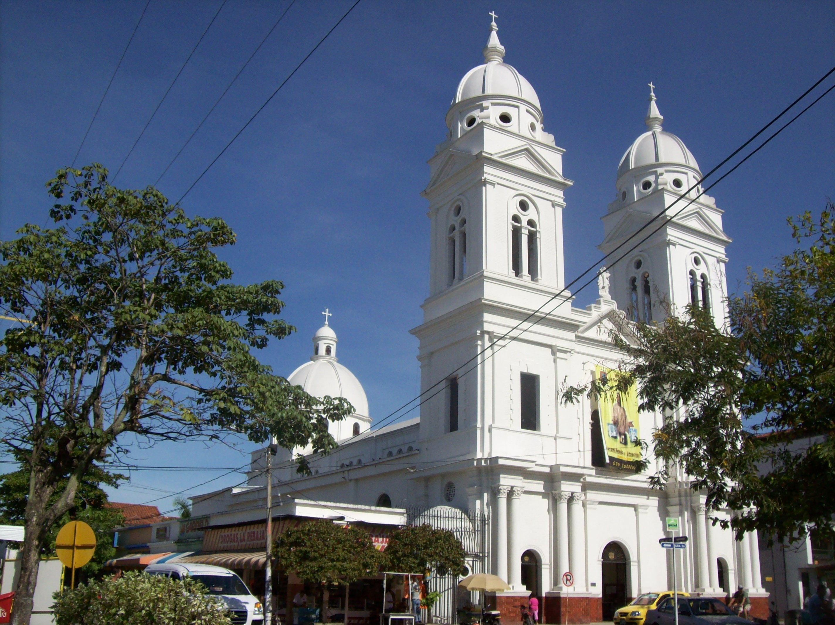 Costado izquierdo de la Catedral de Nuestra Señora del Carmen.